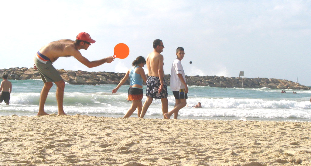 שחקן מטקות בחוף הים.